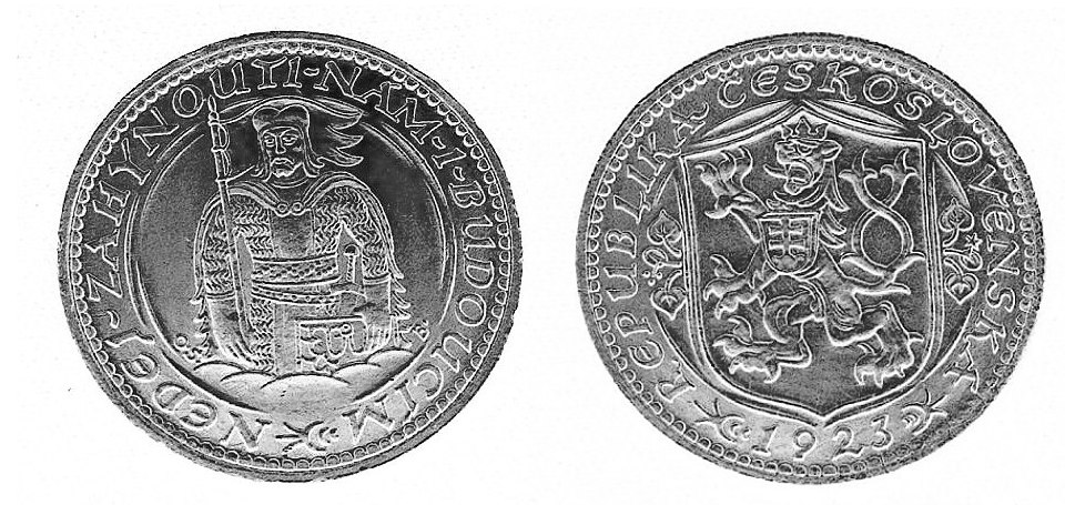 Prvorepublikový dukát s motivem Sv. Václava. Jedna z nejznámějších a nejkrásnějších českých mincí. Autoři micde jsou Jaroslav Benda a Otakar Španiel.